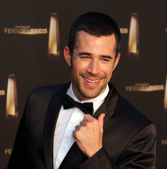 Jo Weil beim Deutschen Fernsehpreis 2012